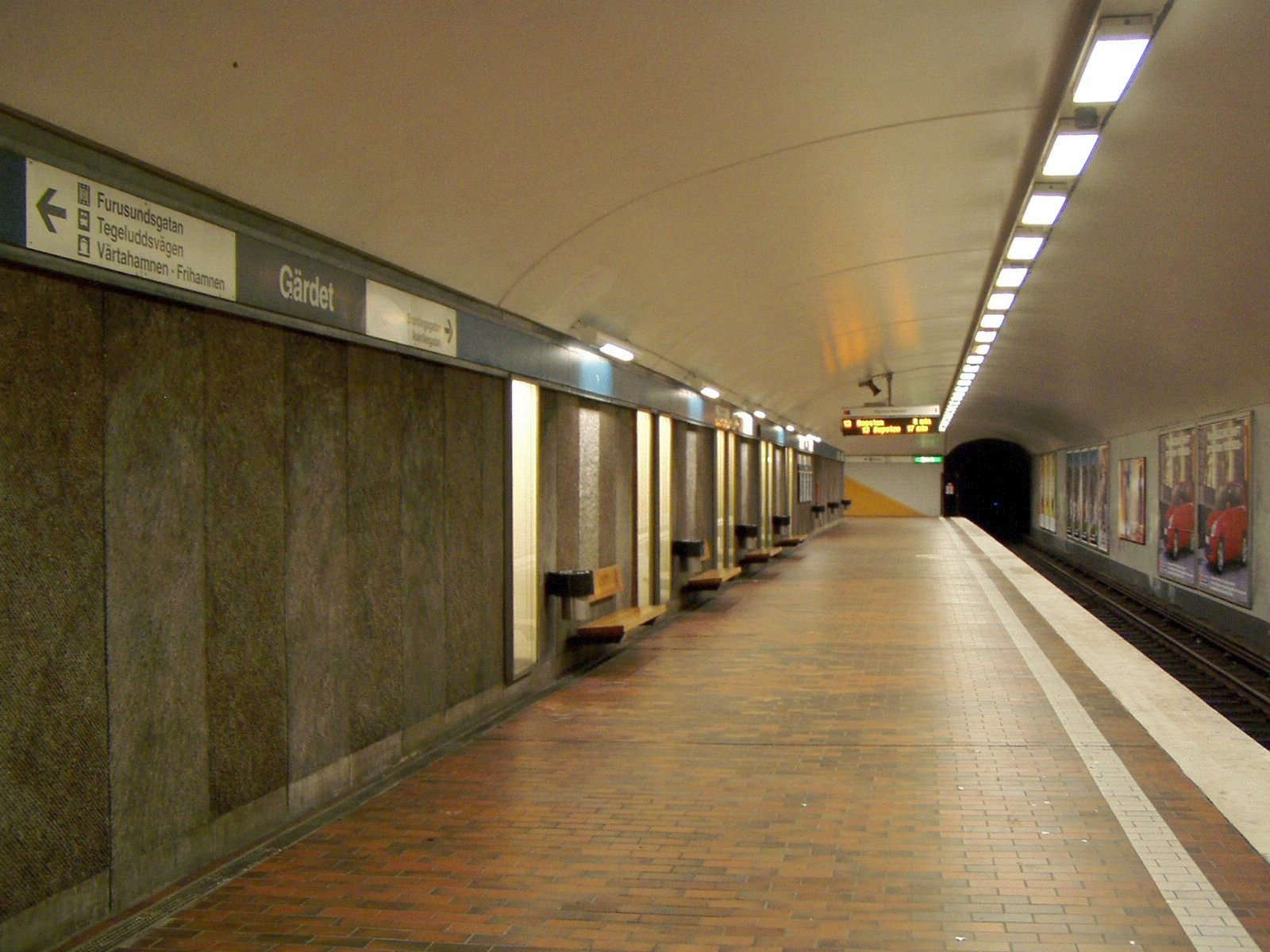 Gärdet, perrongen